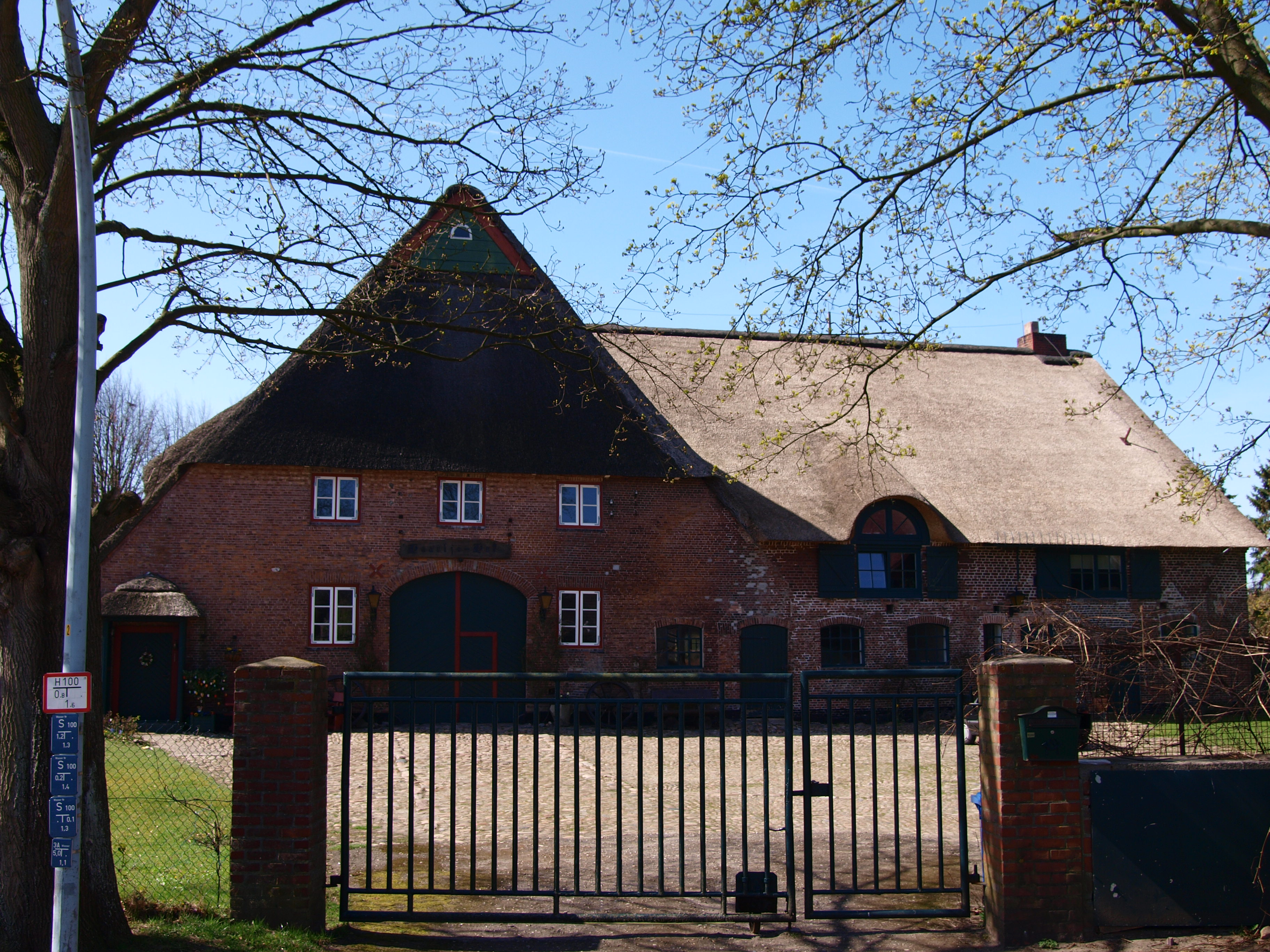 Hallenhaus Haartjehof, Hetlinger Straße 19, Holm (Kreis Pinneberg), Deutschland, vom Hauenweg aus gesehen. Kulturdenkmal von öffentlichem Interesse.